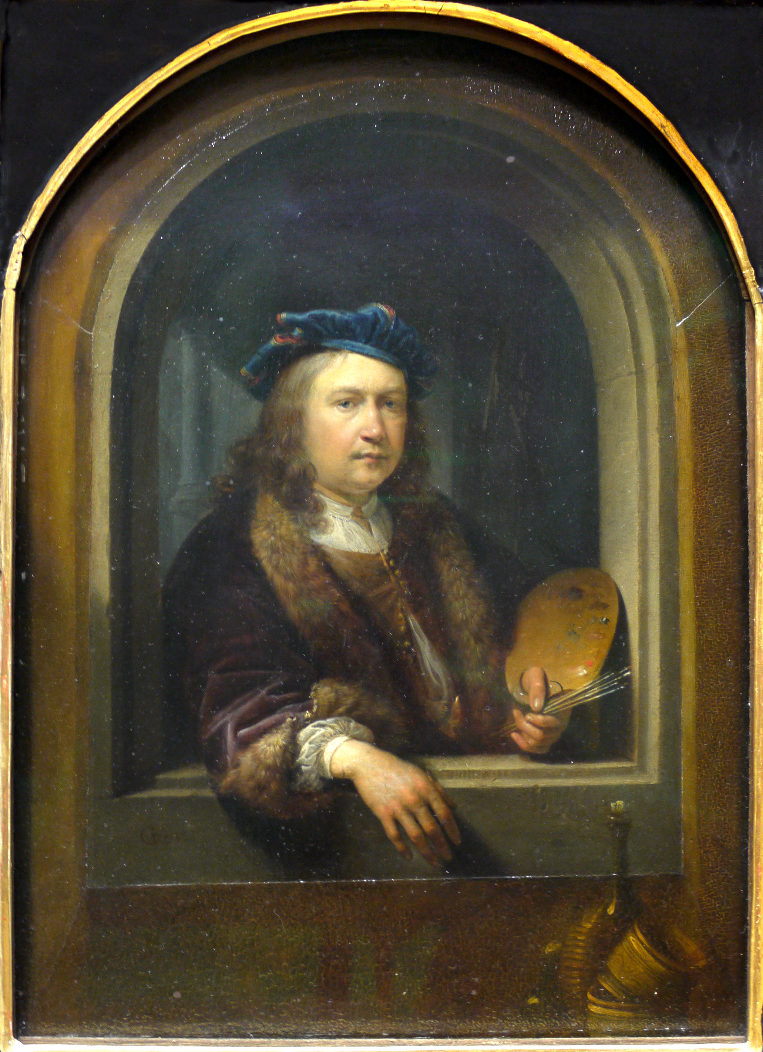 Autoportrait à la palette dans une niche. Tableau agrandi au XVIIIème siècle.